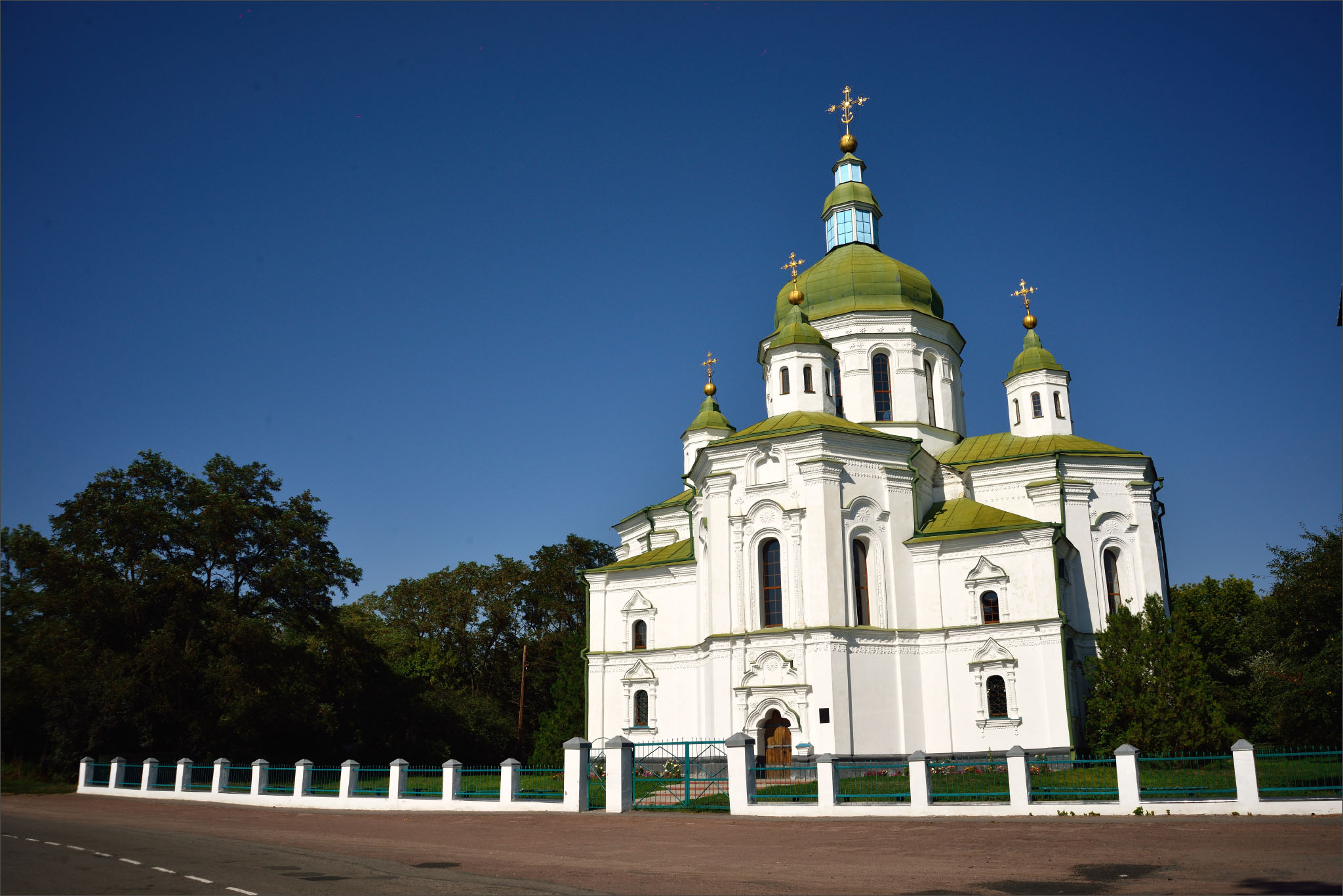 Спасо-Преображенська церква (мур.), Великі Сорочинці